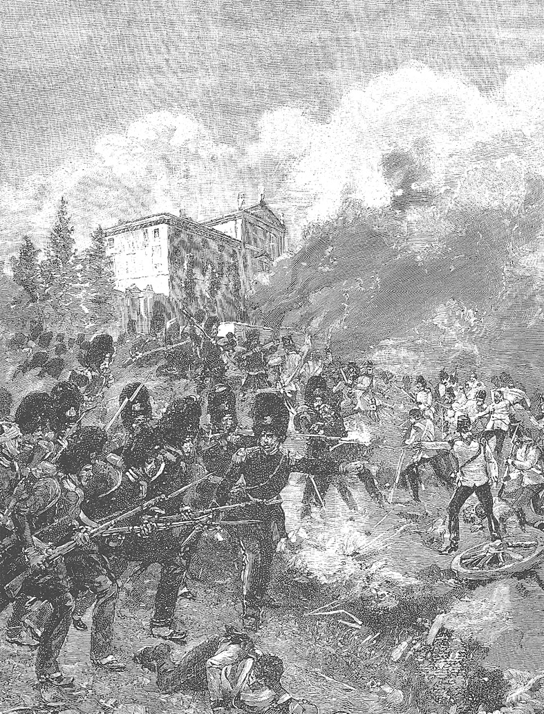 La battaglia di Custoza del 1848